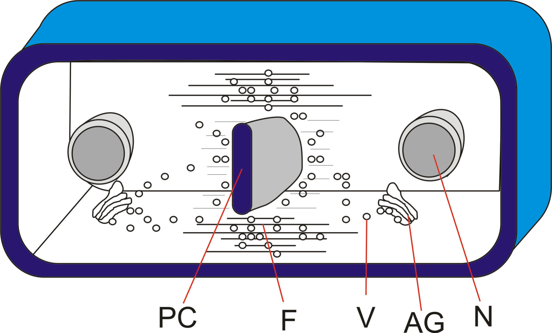 Cell plate formation in a plant cell. PC=cell plate, F=phragmoplast, AG=Golgi apparatus, V=vesicle, N=Nucleus